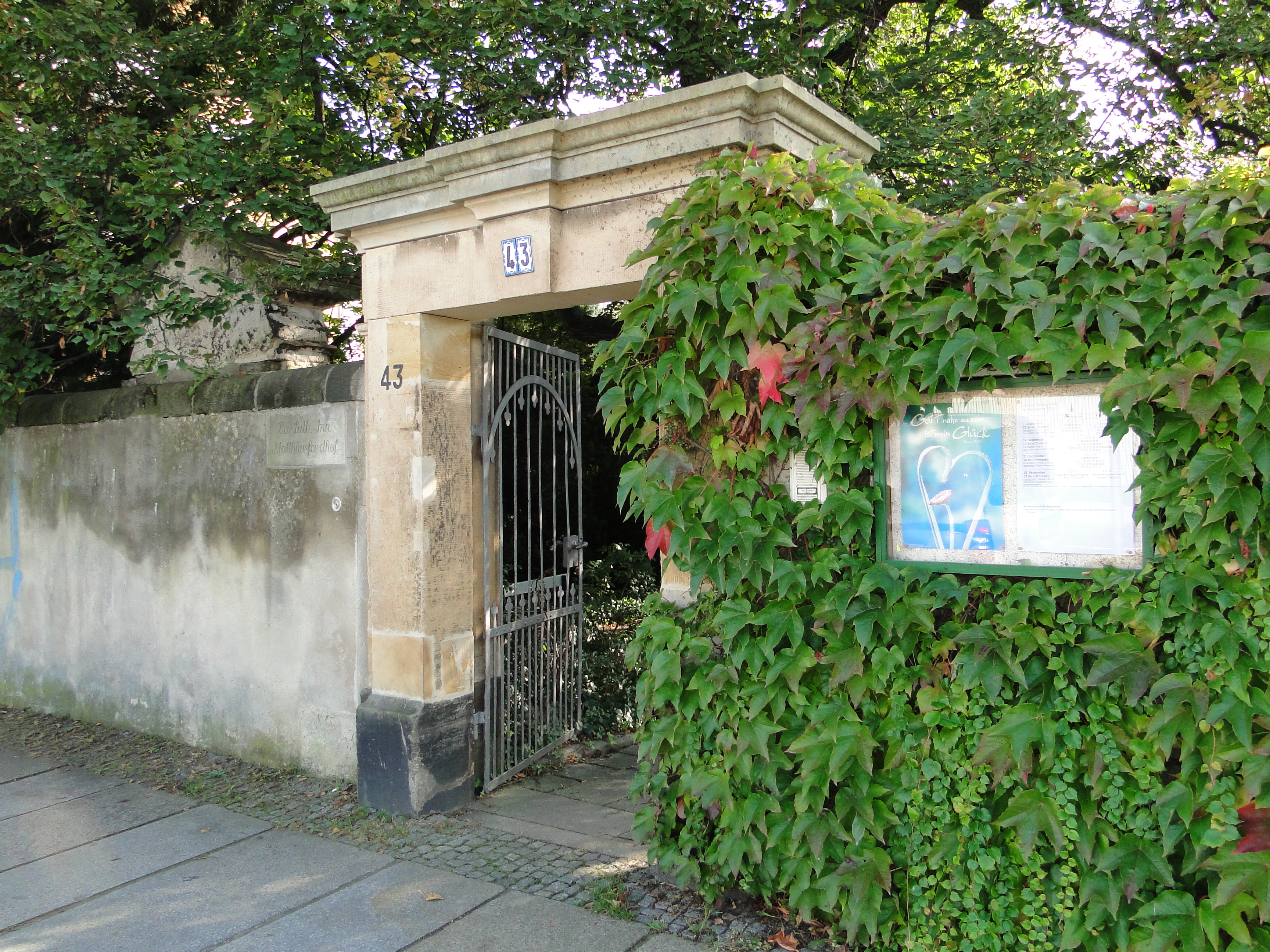 Eingang Innerer Matthäusfriedhof Dresden